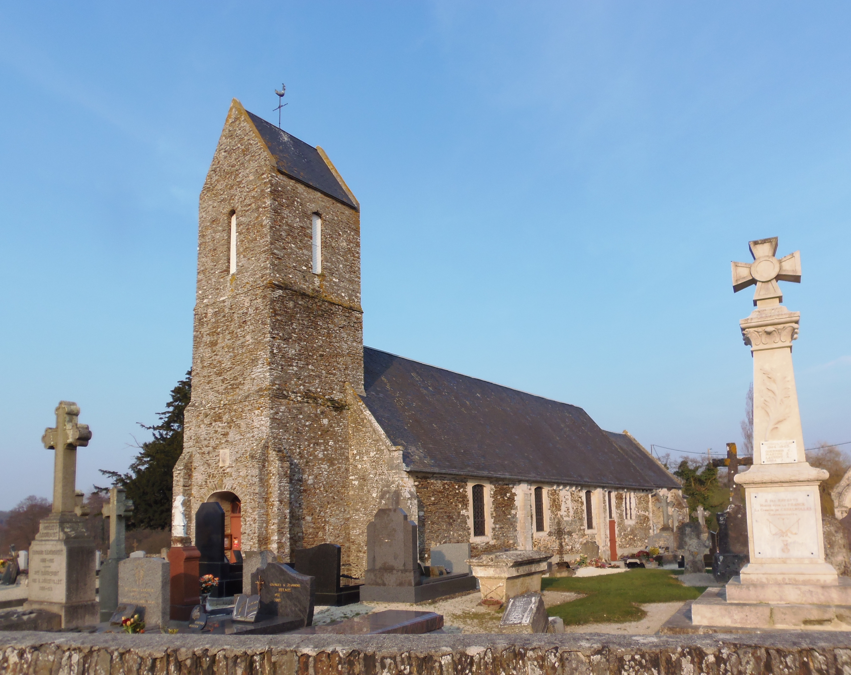 Cahagnolles (Normandie, France). L'église Saint-Pierre.